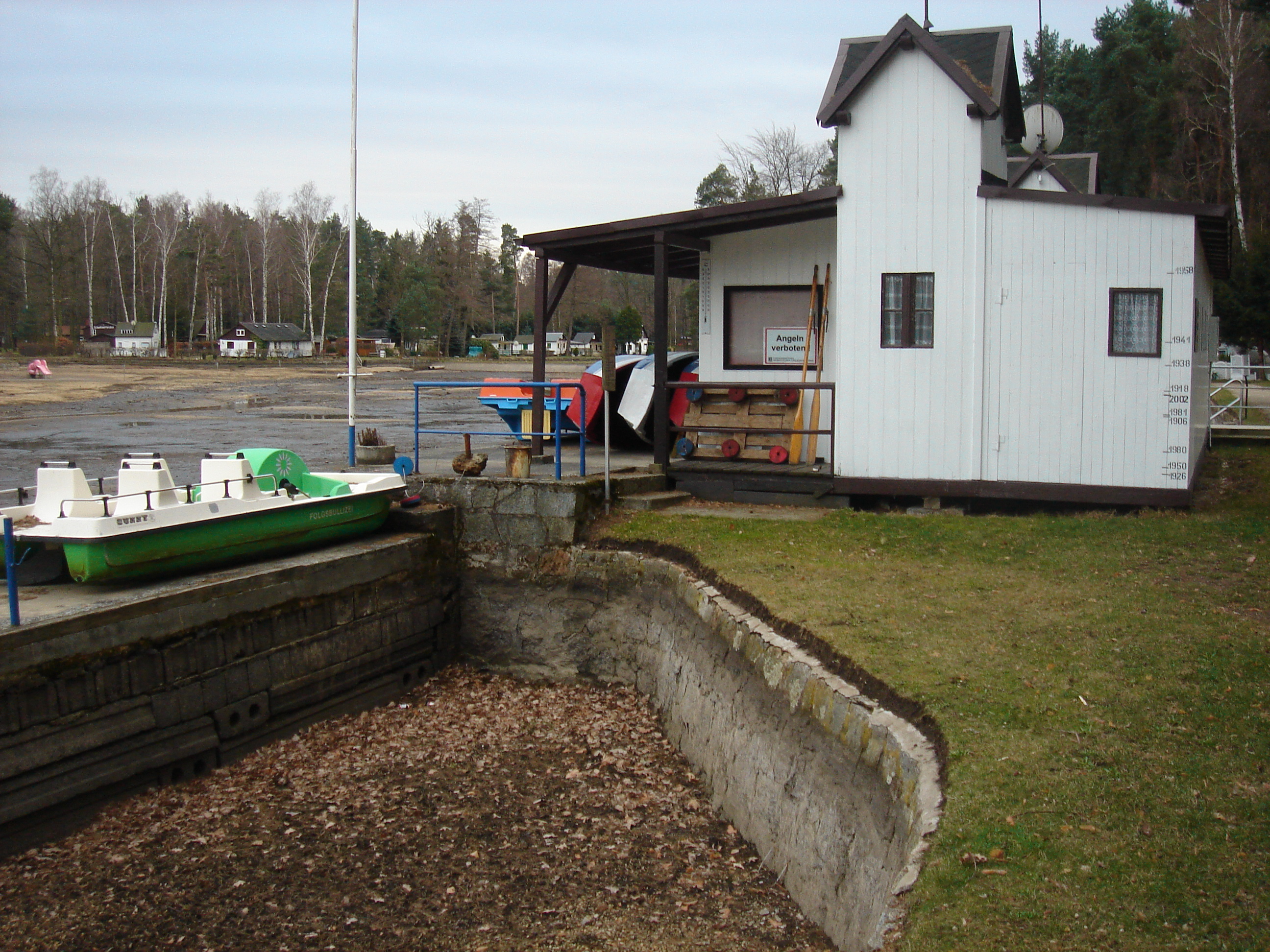 Hochwassermarken des Großteichs an einem Gebäude des Waldbads Weixdorf, Dresden